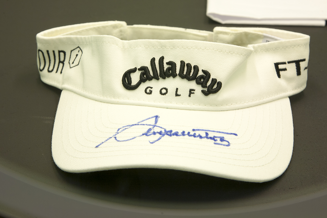 Fotografies d'Hèctor Juan de l'exposició temporal del Museu Valencià d'Etnologia "Objecte de desig".